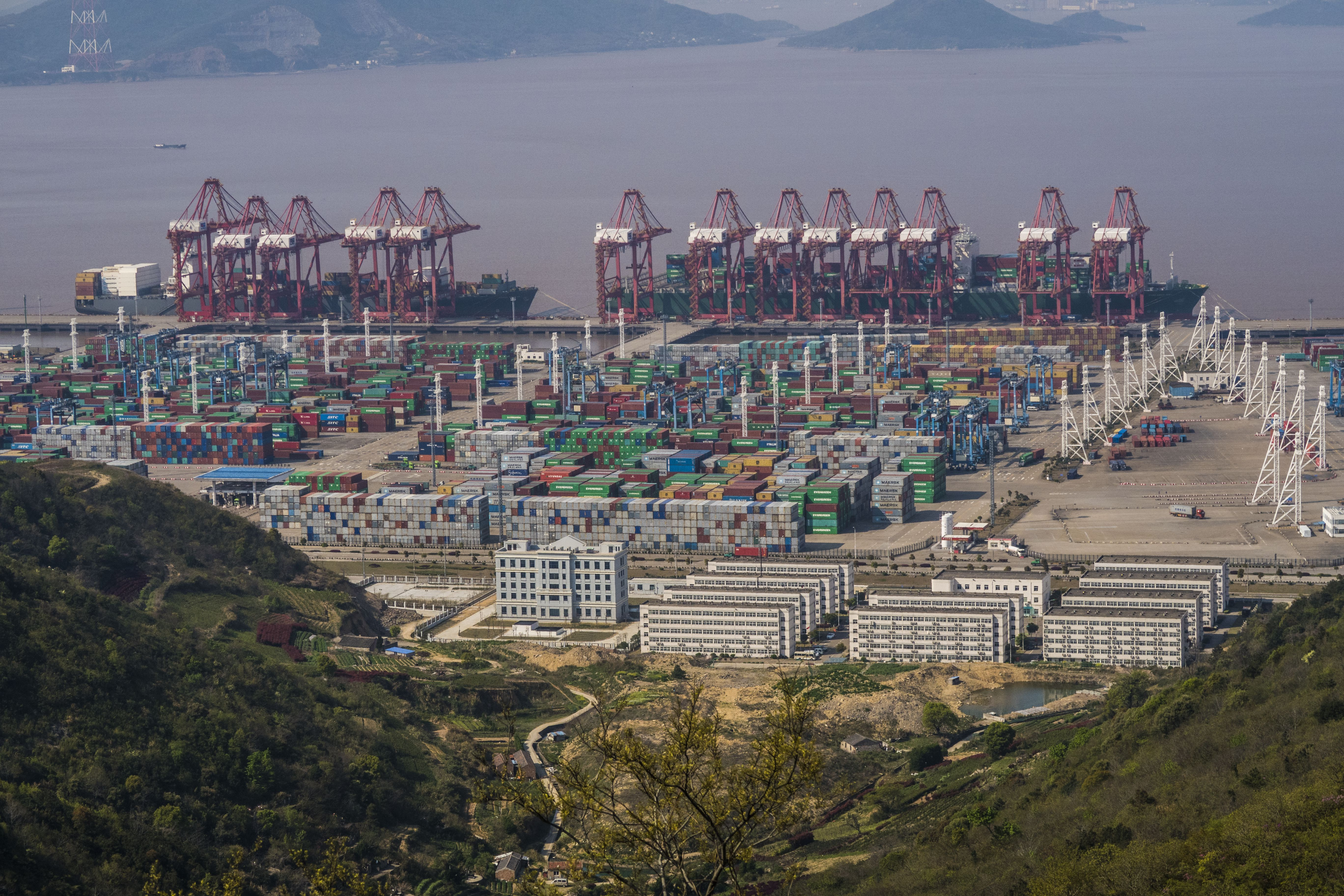 宁波港穿山港区泊位